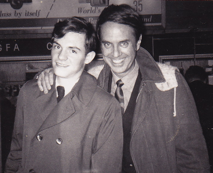 John Zacherle (right) in 1968.